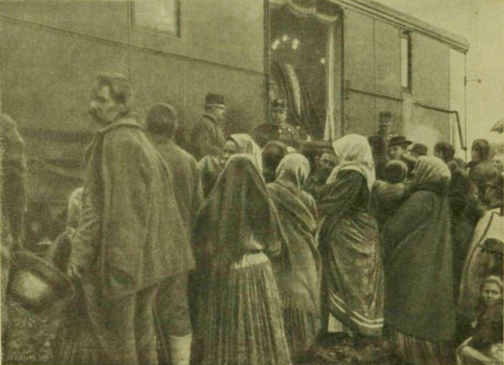 A bujdosó kuruc fejedelem, II. Rákóczi Ferenc hamvainak hazahozatala